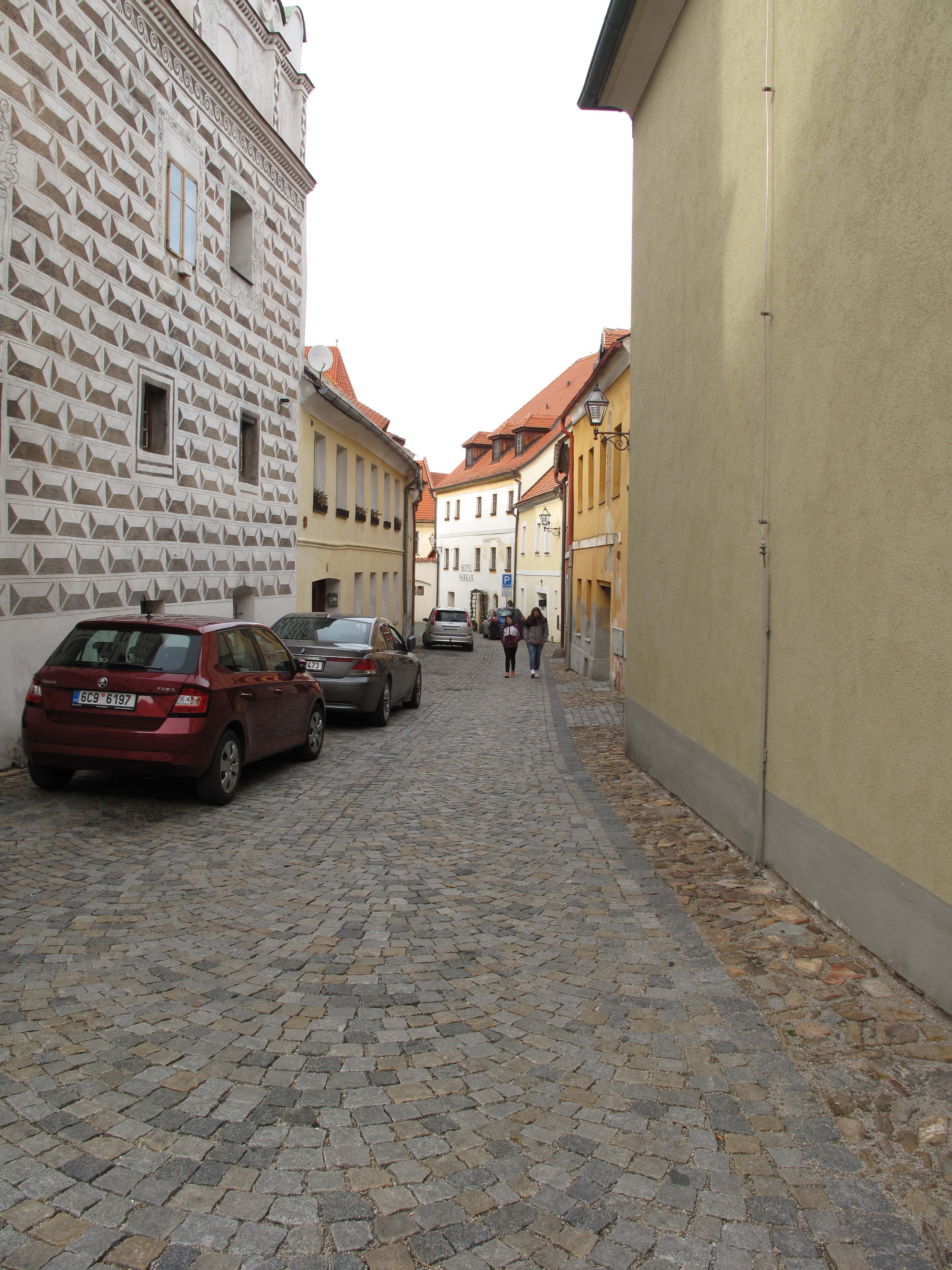 Ulice Věžní v Prachaticích. Česká republika.